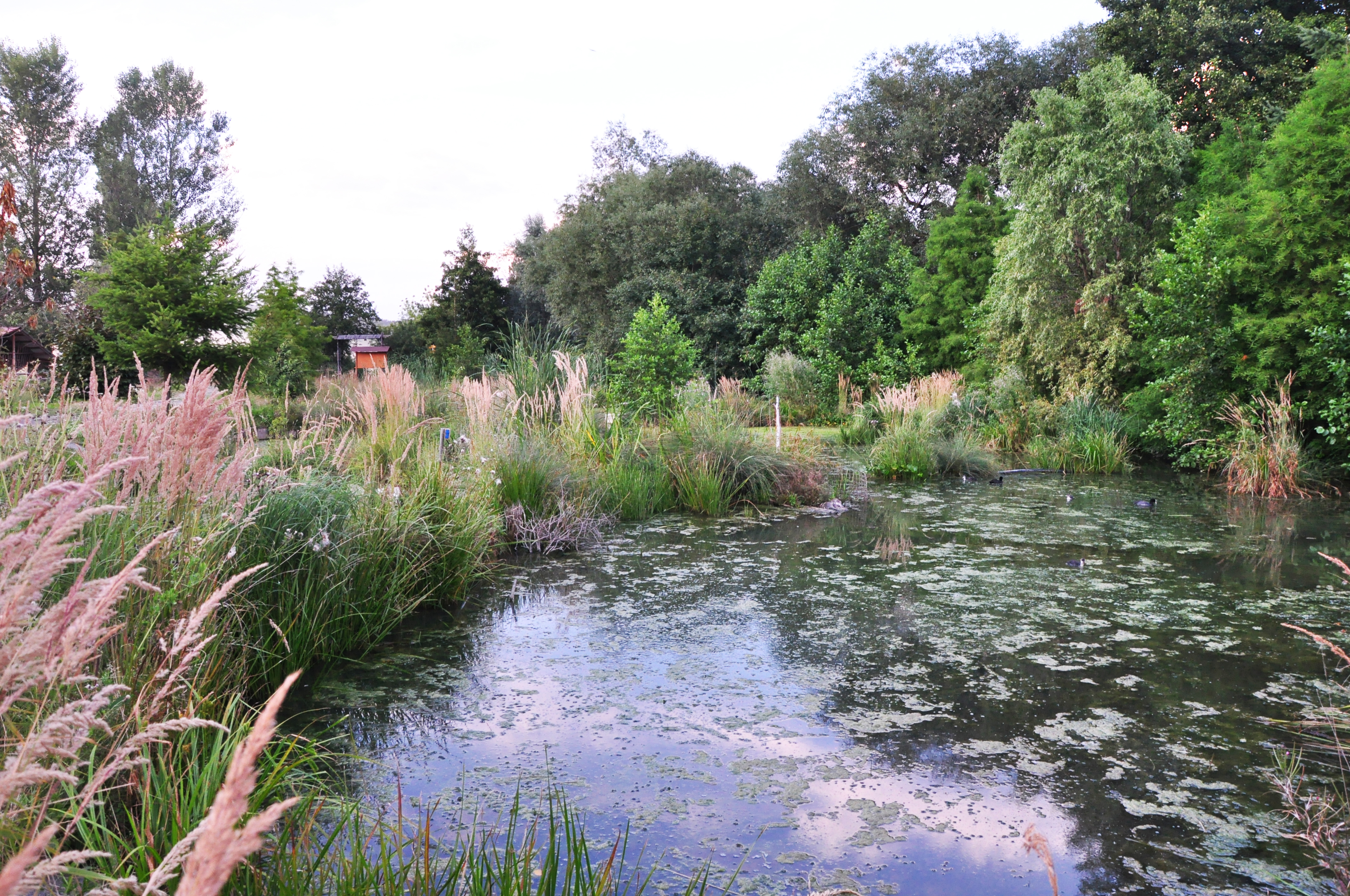 Přirozený výskyt vysoce ohrožených druhů fauny a flory